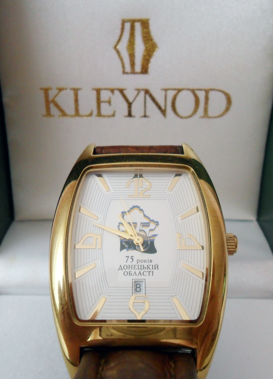 Наручные часы "KLEYNOD" Киевского часового завода.